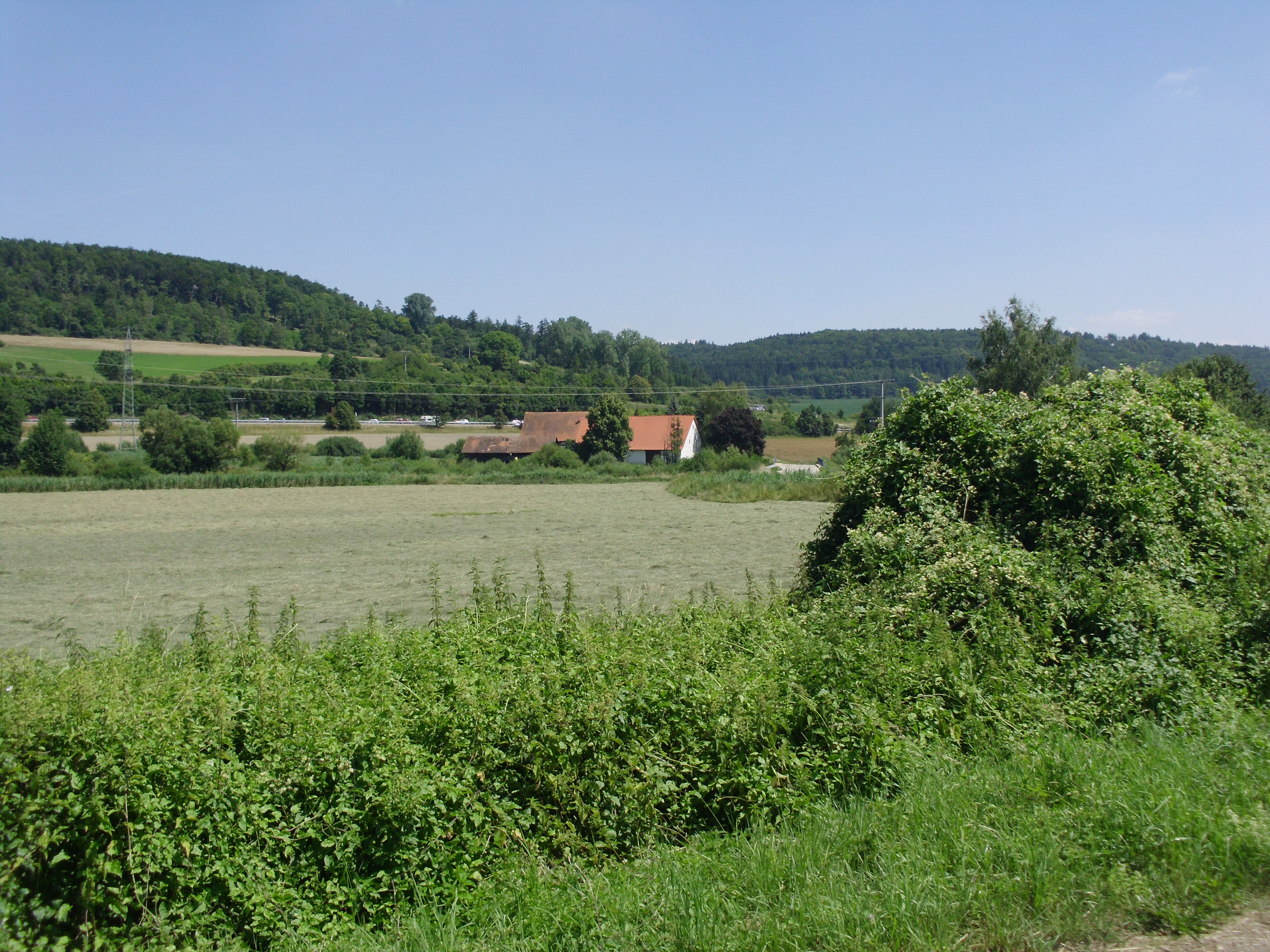 Günzenhofen, Ortsteil von Greding im mittelfränkischen Landkreis Roth in Bayern, ehemalige Mühle